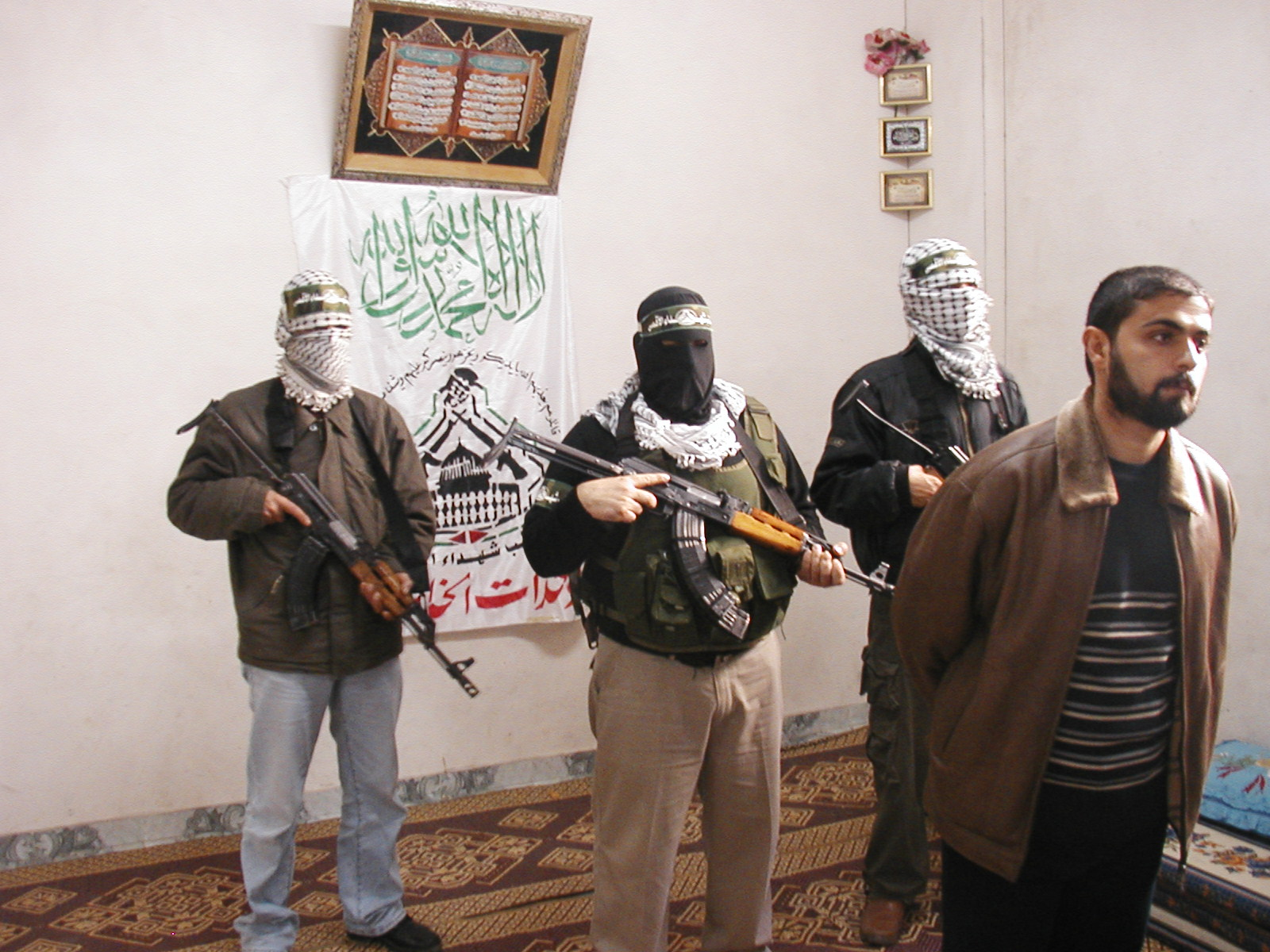 Milicien d'une branche disidente du Fatah à Gaza en 2005